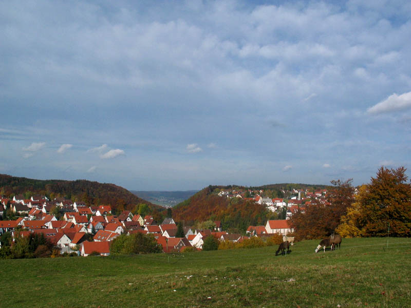 Stadtansicht Messstetten